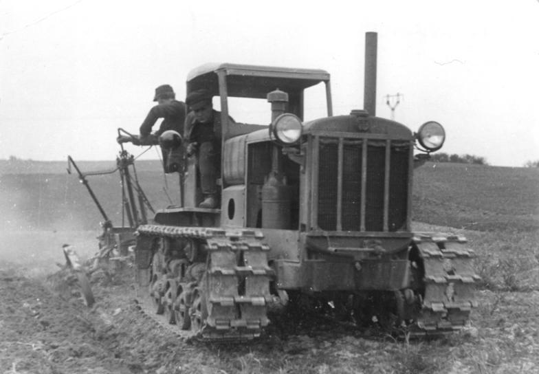 Schwerin, Feldarbeit Schwerin Feldarbeiten mit Traktor Zentralbild Berlin W 8 Ho